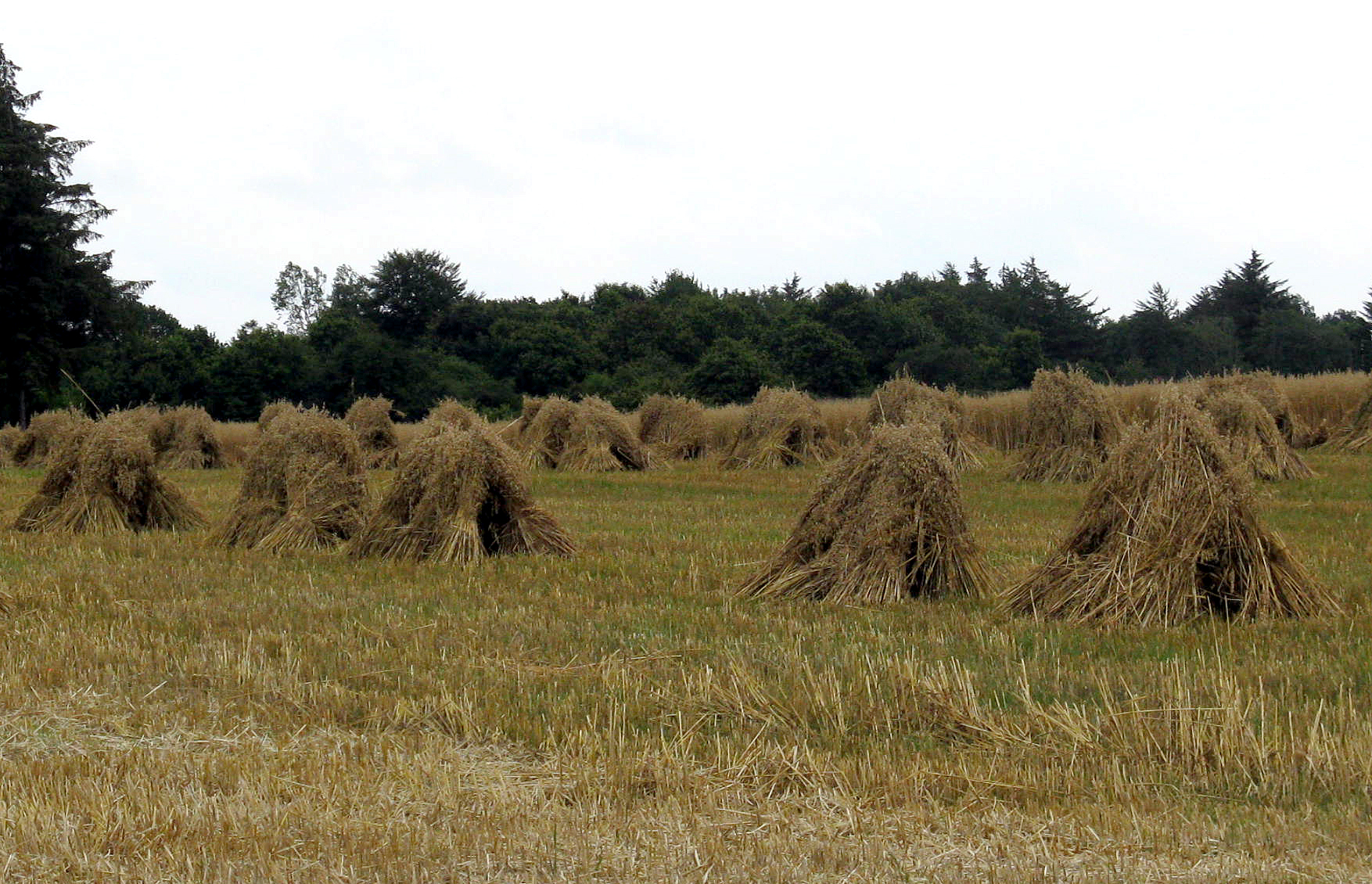 Trave|Traver in Østjylland Denmark